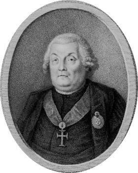 Recorte y paso a grises del retrato ovalado de Pina Manrique